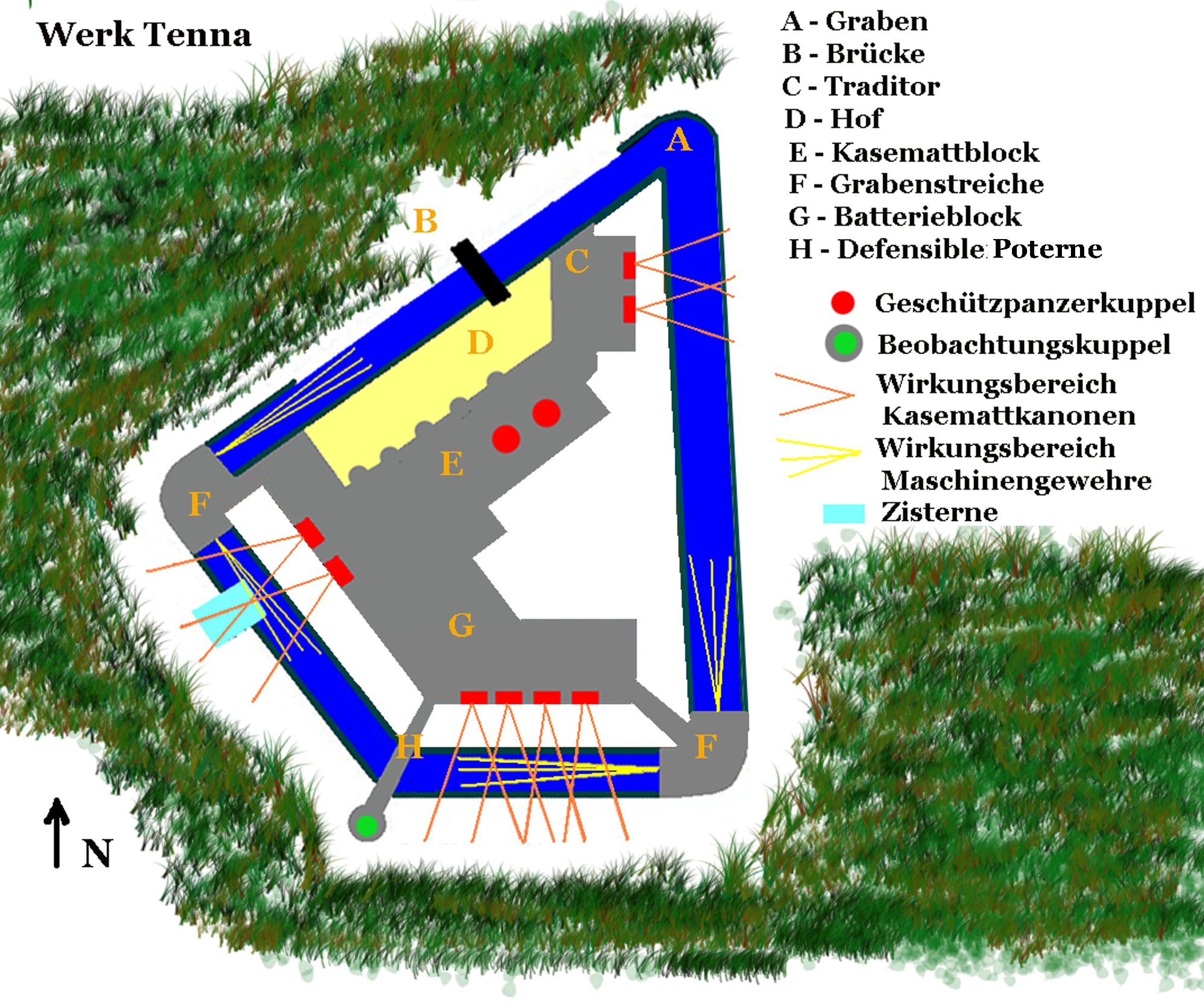 Plan des österreichisch-ungarischen Festungswerks Tenna im Trentino.